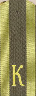 Погоны на рубашку